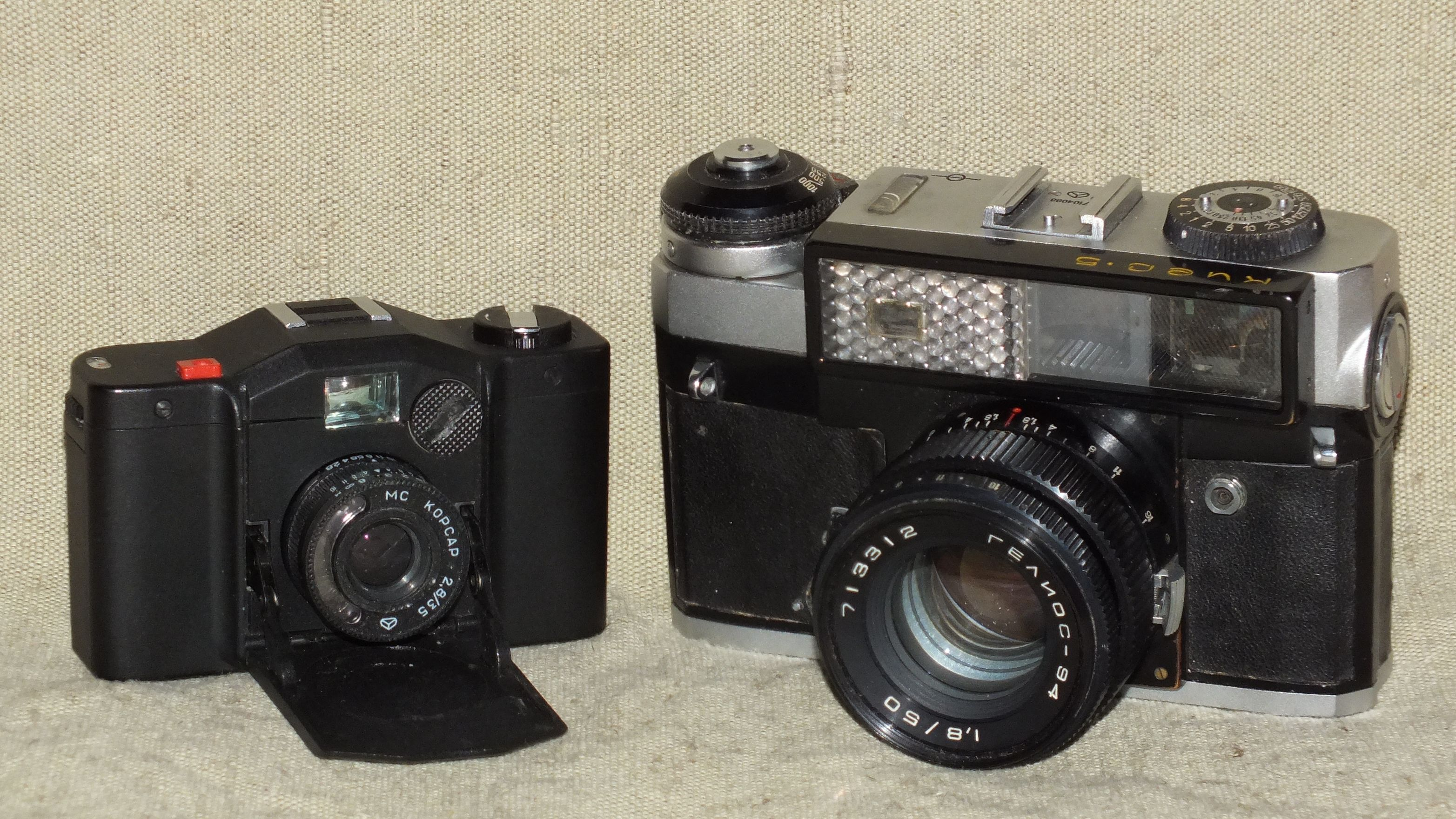 Киев-35 и Киев-5